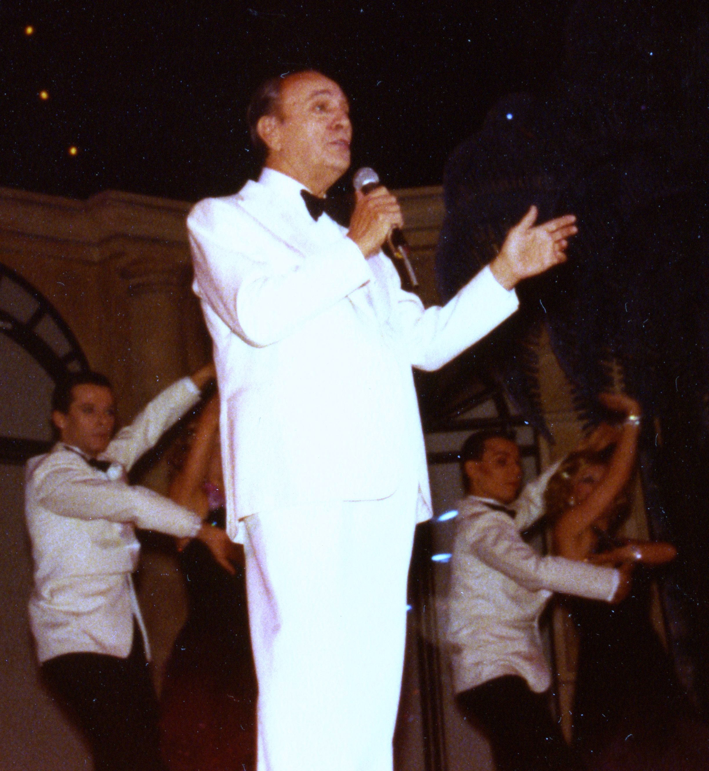 Spectacle "Cinquante ans d'amour", Casino de Paris, dernière du 2 janvier 1983.